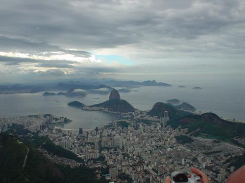 Foto do Rio de Janeiro - bairros de Botafogo e Urca.